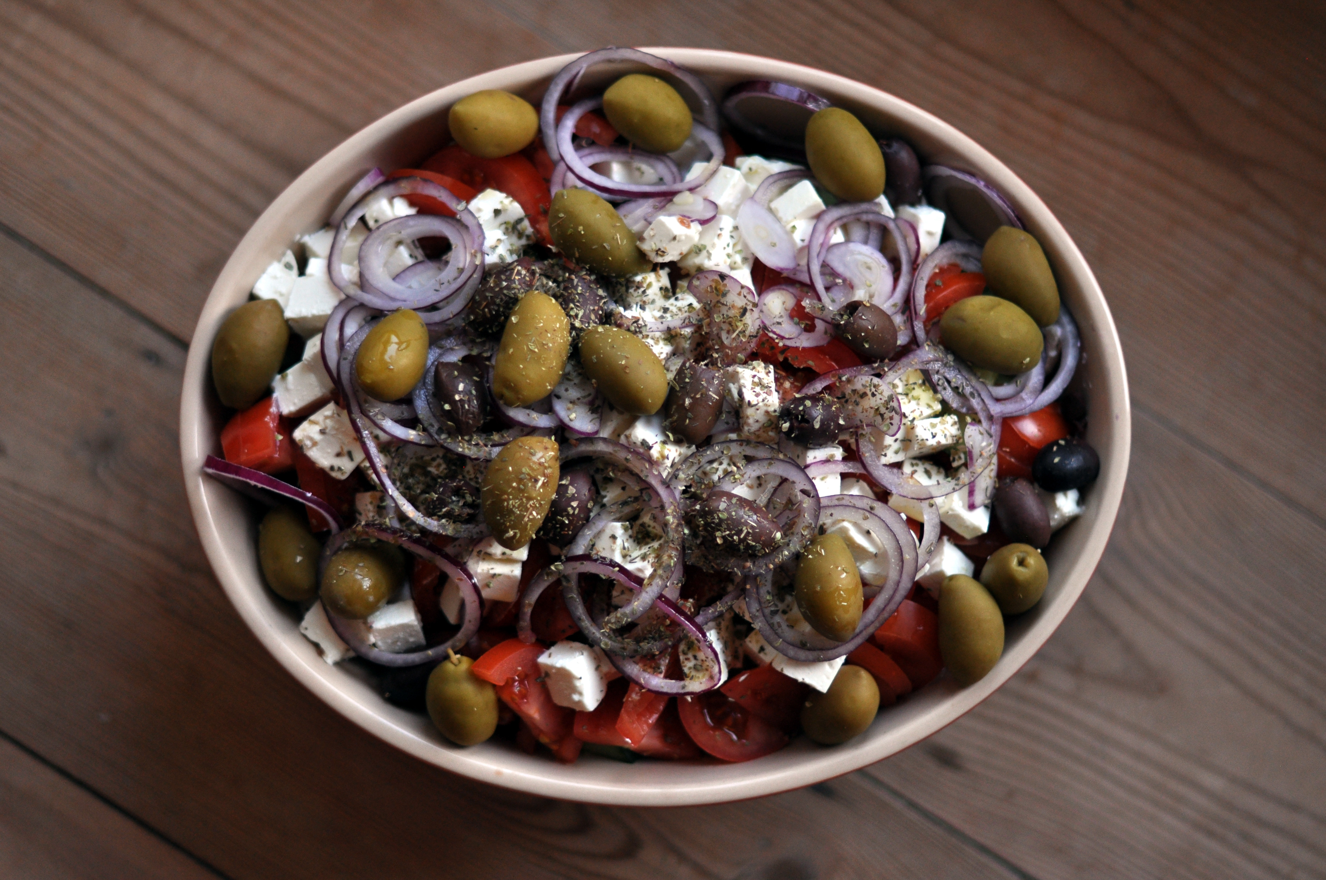 Græsk salat